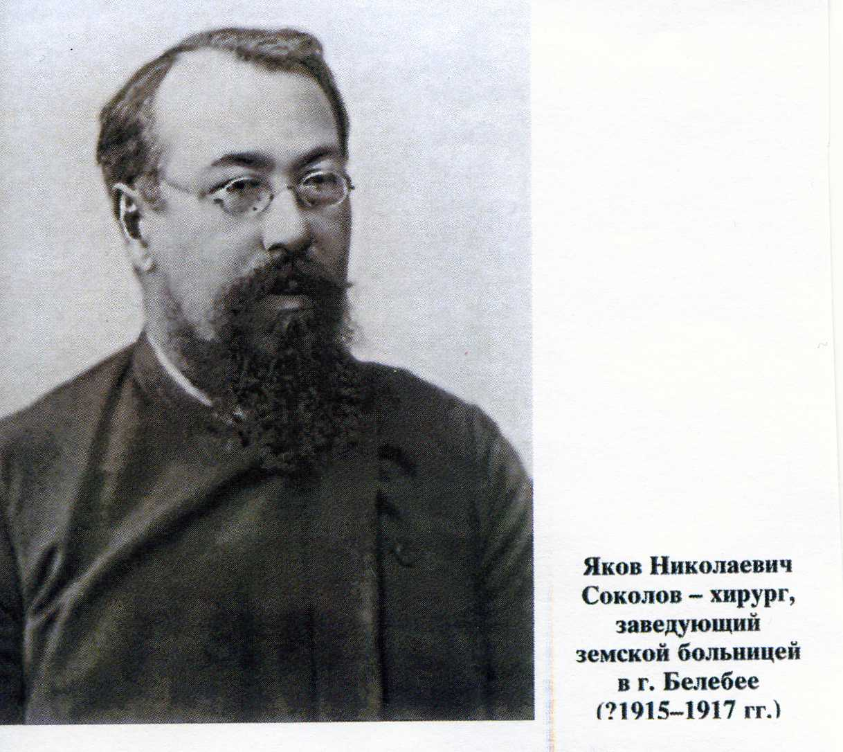 Яков Николаевич Сколов - хирург , заведующий земской больницей в г. Белебее?1915-1917гг.